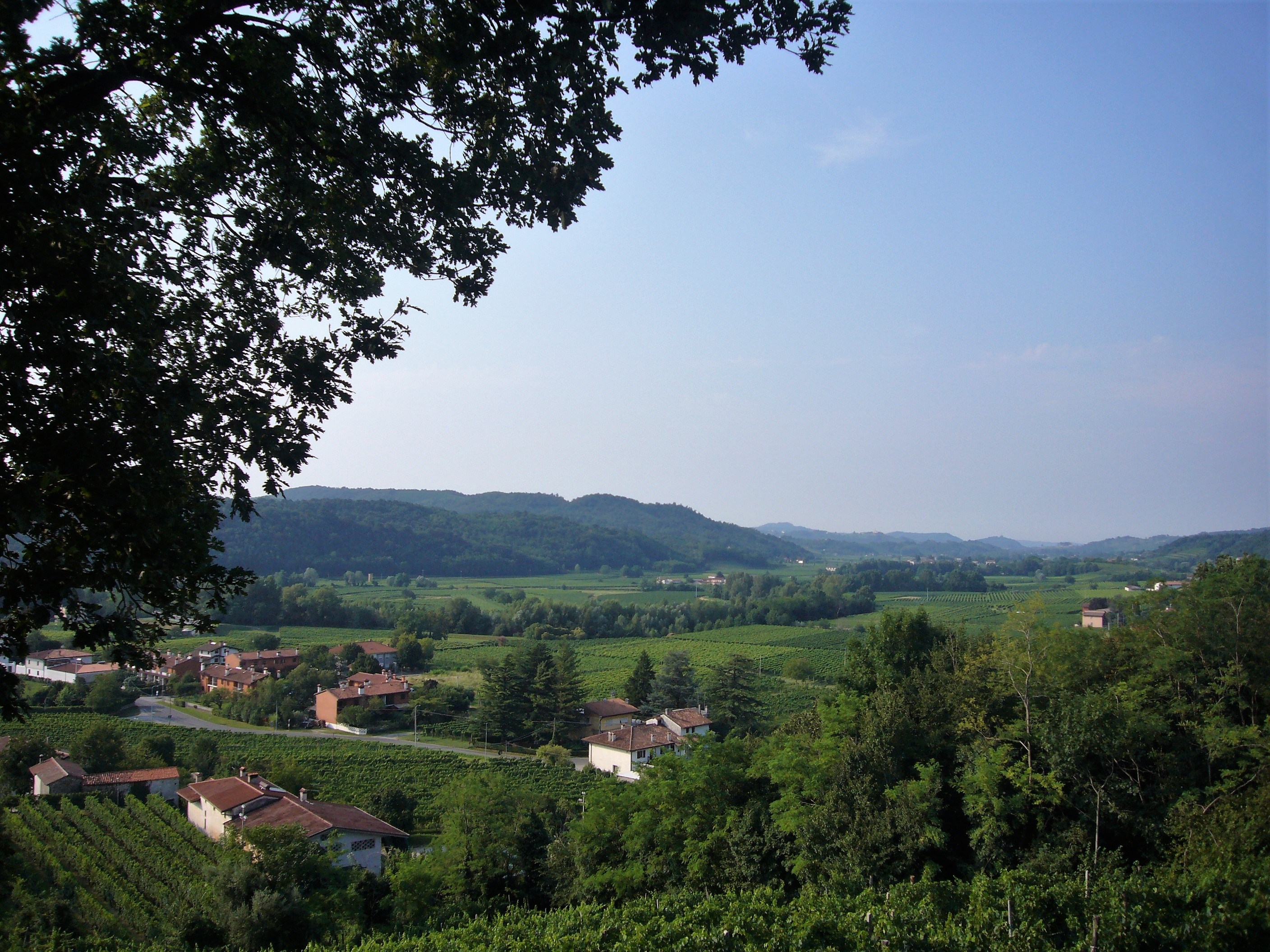 Panorama che si gode dallo spiazzo della chiesa dello Spirito Santo ad Albana